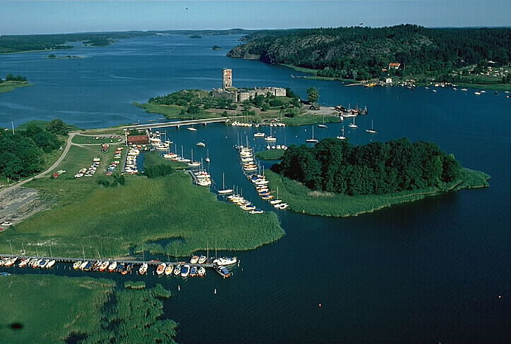 Bilden troligen från början av 1980-talet. Motiv: Stegeborg Nyckelord: Flygbilder, Riksintressen Kategori: Slott/herresäte Bilden troligen från början av 1980-talet.